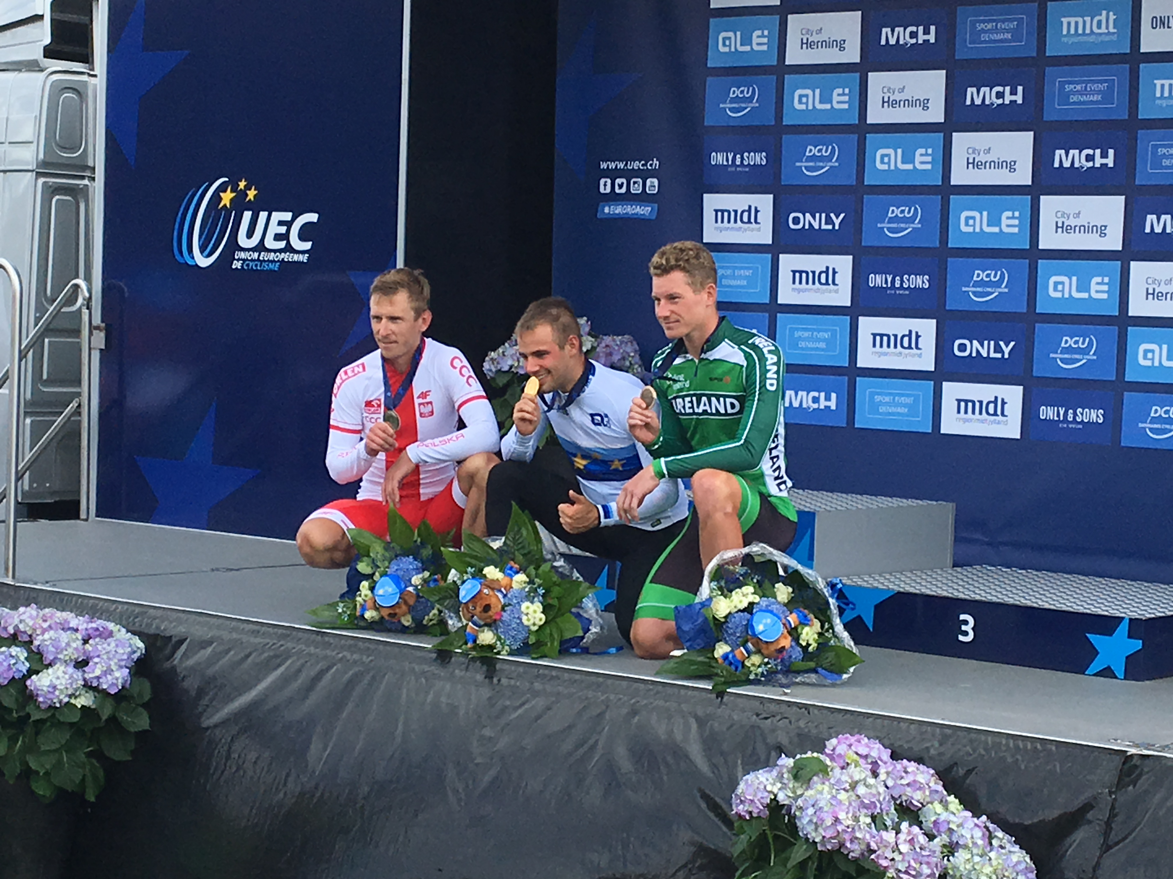 2017 European Road Championships – Men's time trial, Podium